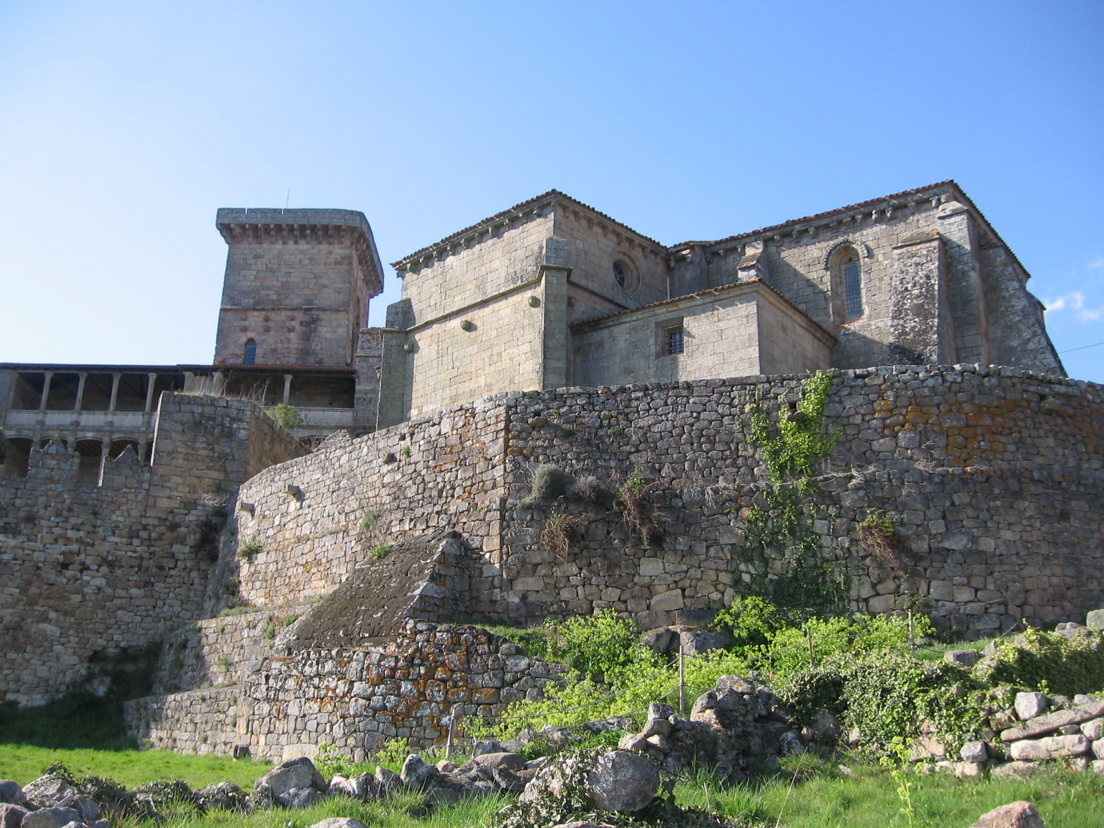 Monterrei, Galiza, Espanha